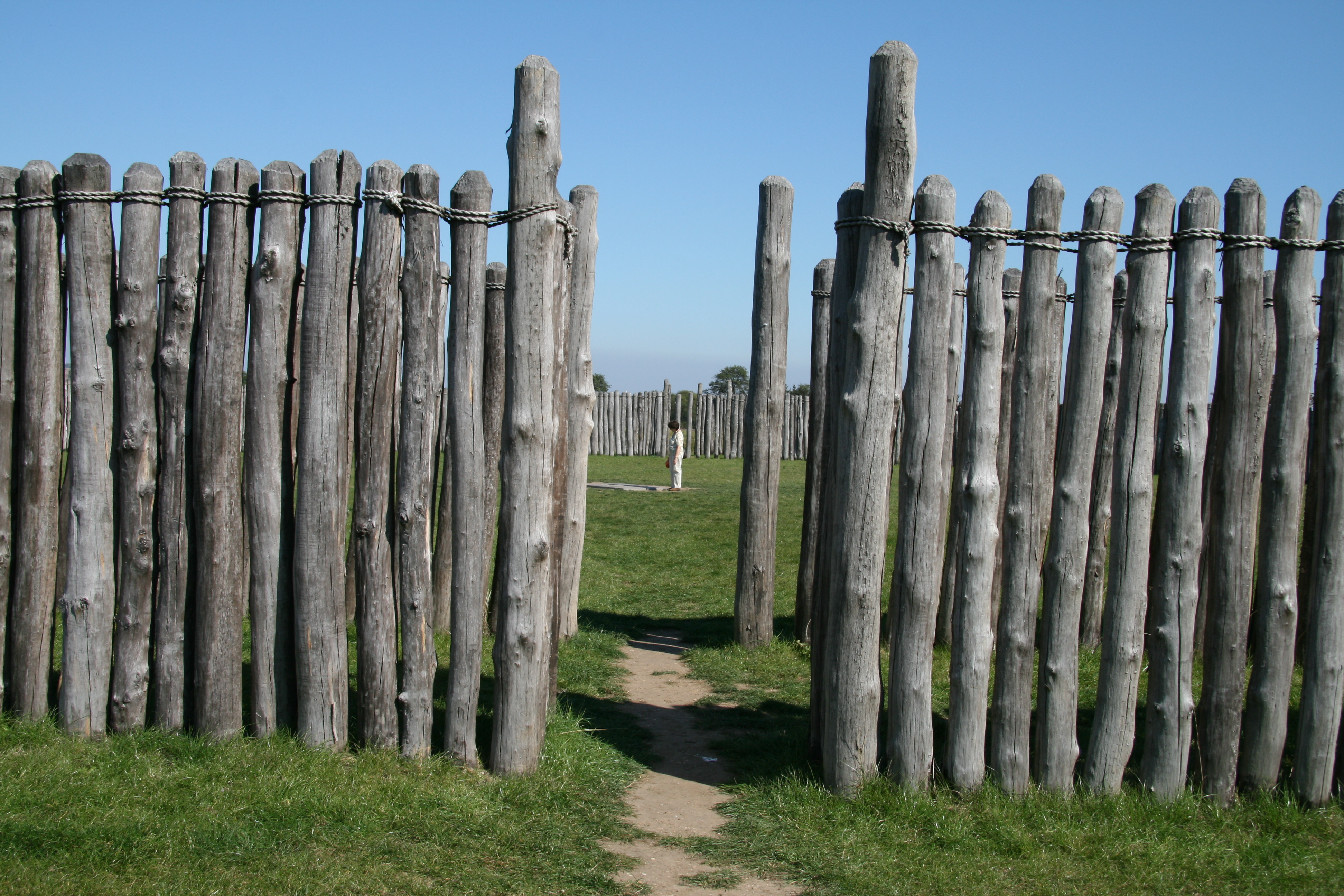 Goseck. Sonnenobservatorium. Öffnung der Anlage an der Süd-West-Seite.